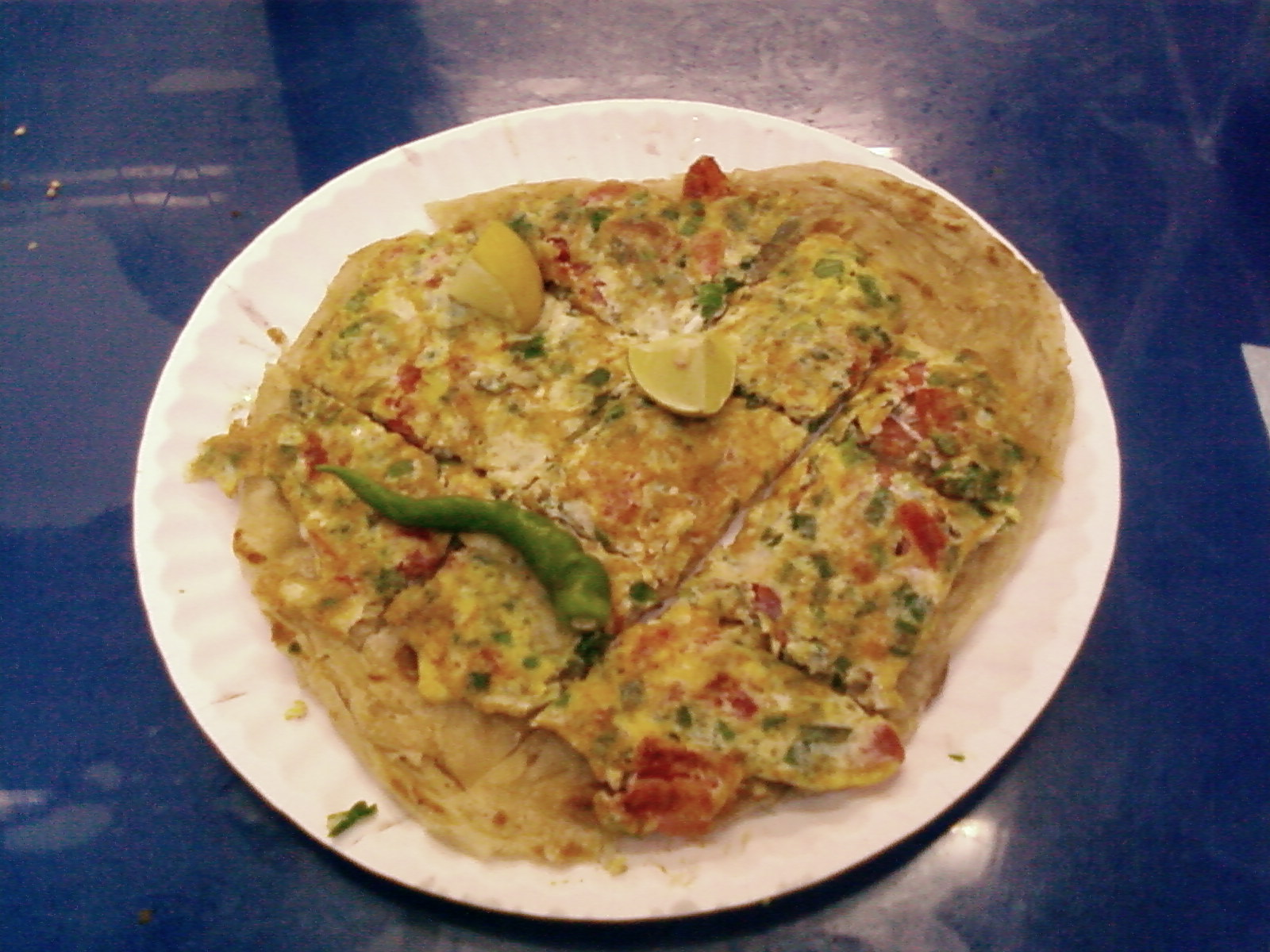 പൊറാട്ട